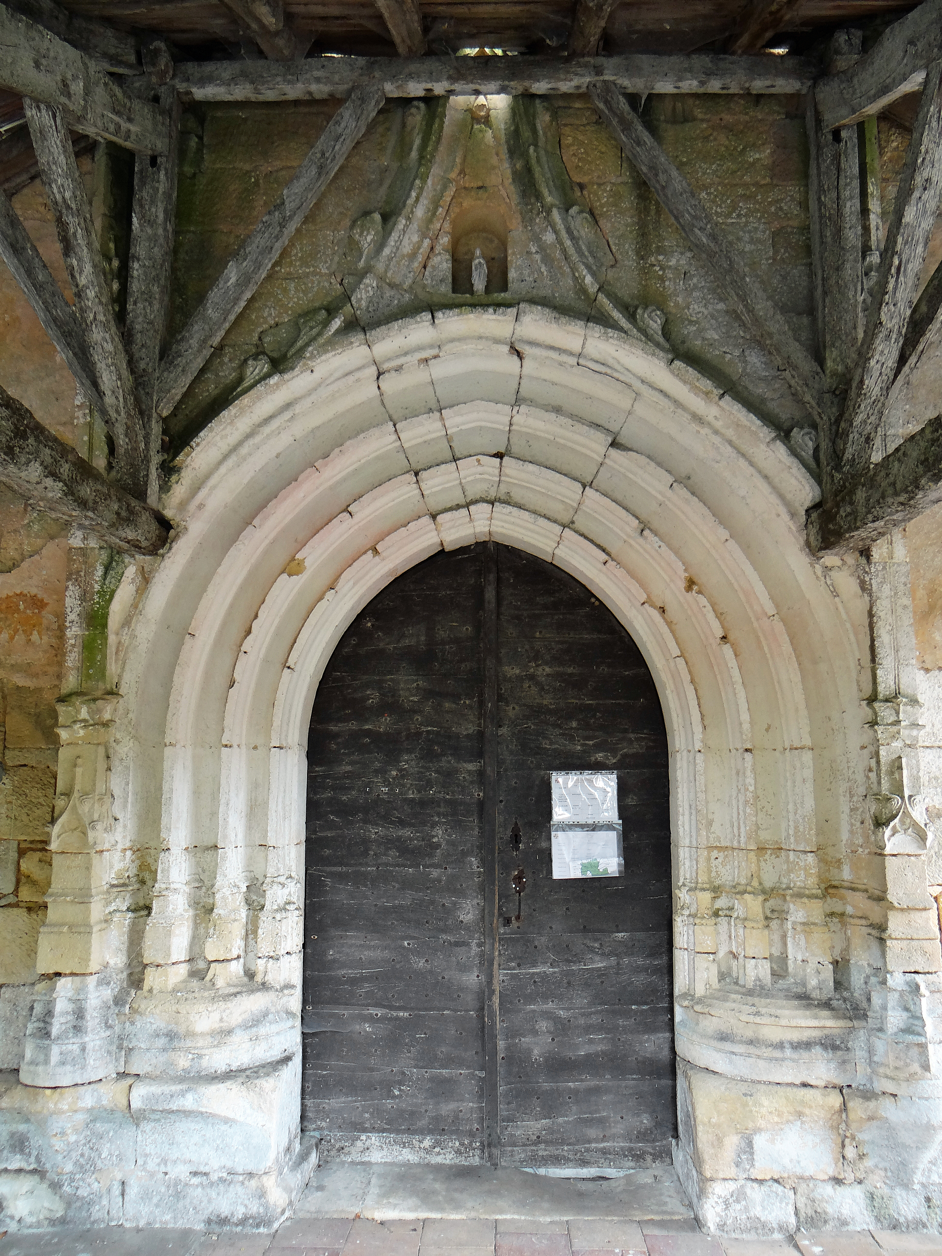 Paulhiac - Église Saint-Vincent de Souliès - Portail du XVème siècle .